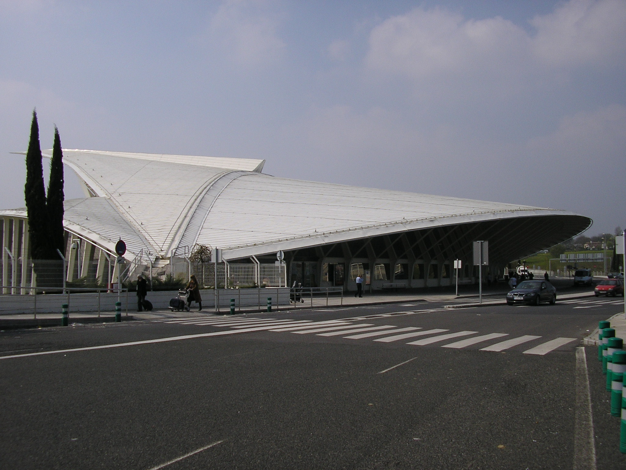 Airport Bilbao